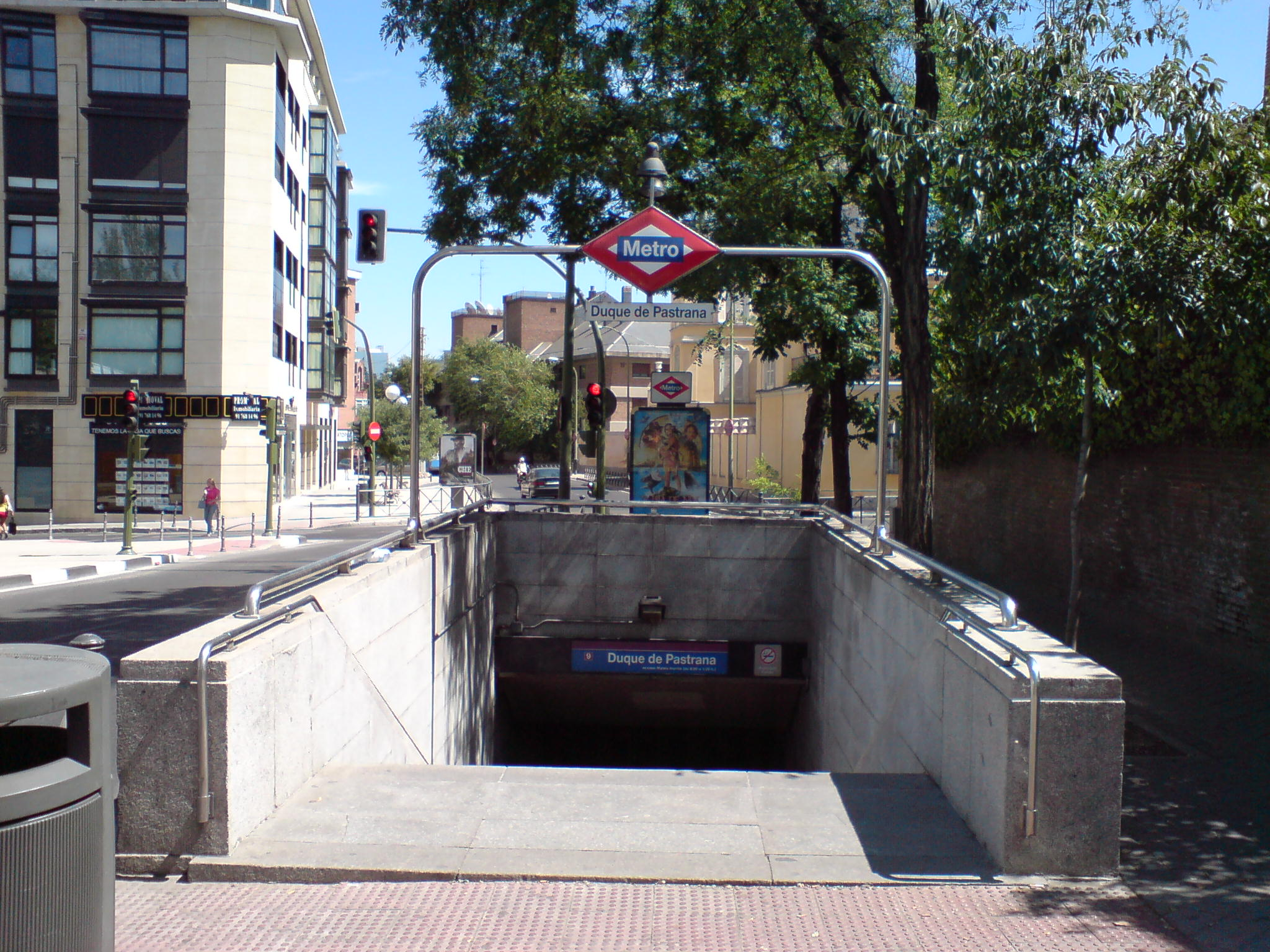 Boca de la Estación de Duque de Pastrana. Por detrás se ve el Palacete de Pastrana, propiedad de la ONCE, uno de los dos posibles donde residió Napoleón en Chamartín